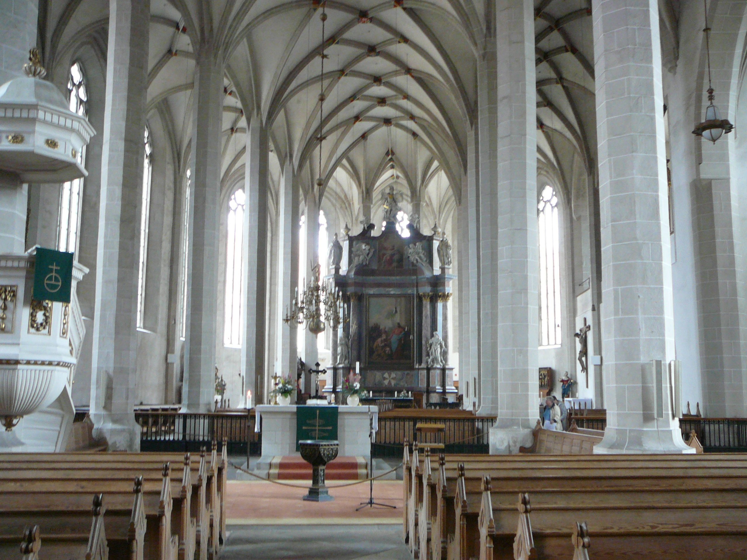 Bautzen, Dom St. Petri 1430-1664, Kirchenhalle Richtung Altar